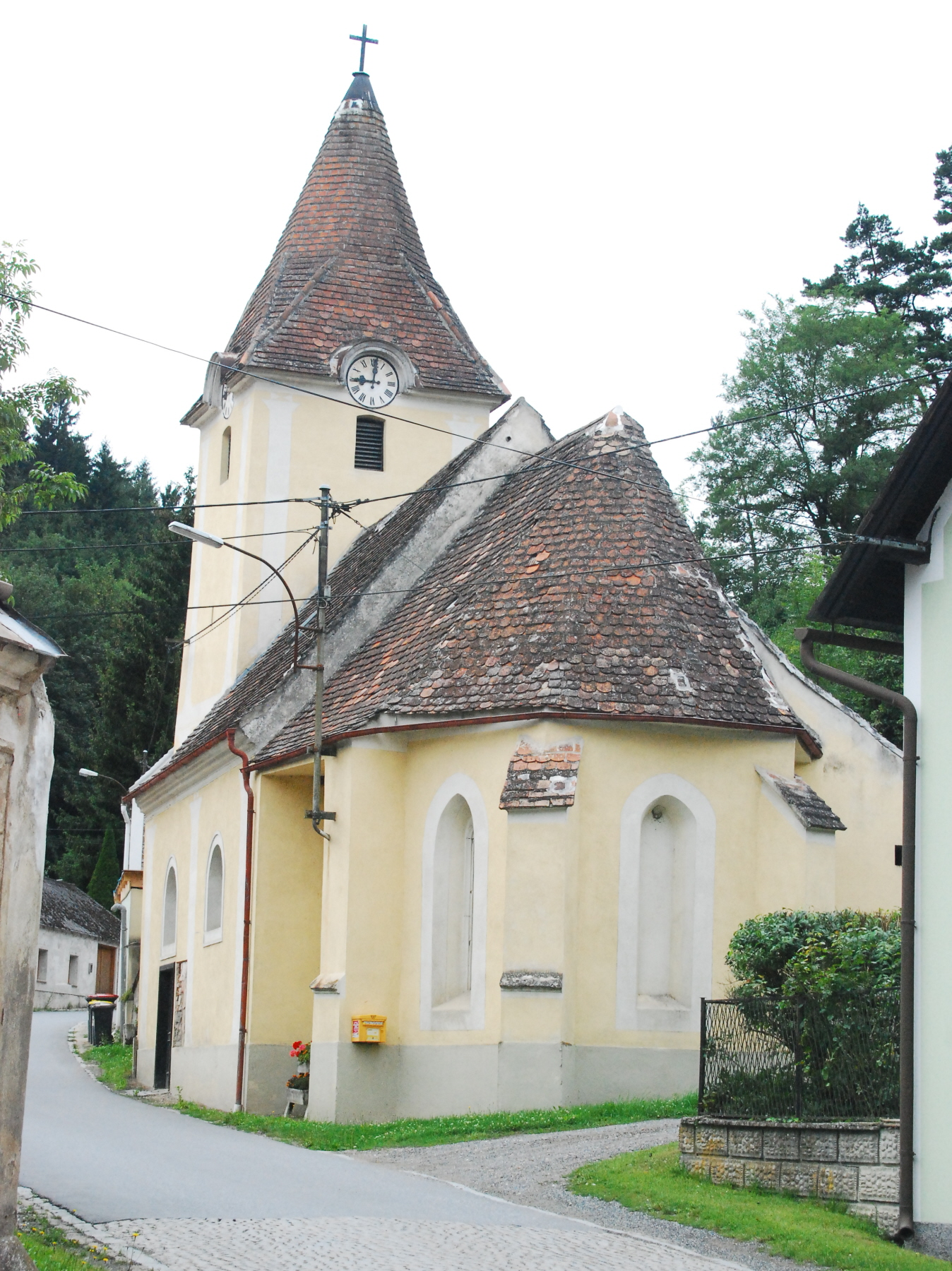 Kapelle von Unterthürnau in Niederösterreich